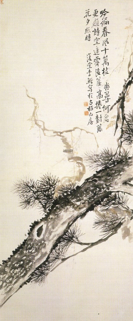 Pin et Glycine par le peintre chinois Li Shan. Rouleau mural, encre et couleur su papier, daté 1730. 124x62,6cm. Musée du palais impérial. Beijing.